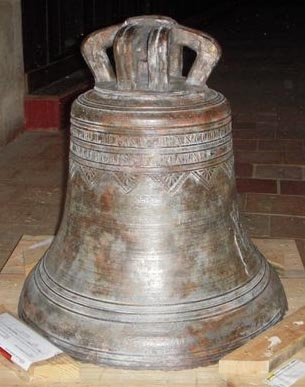 La cloche Françoise Julienne de Saint-Georges-du-Bois dans le département français de la Sarthe après sa rénovation en décembre 2008.